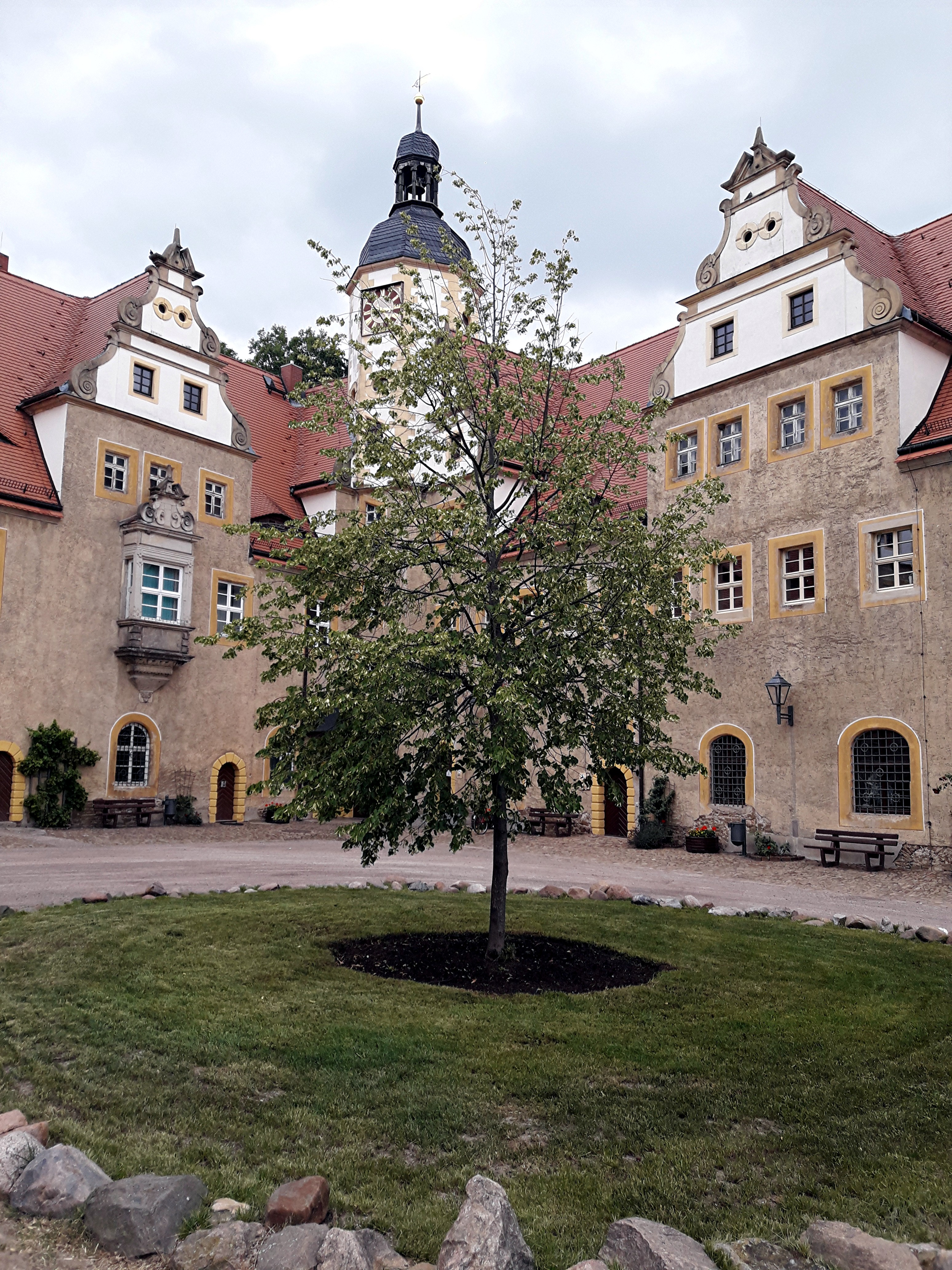 2011 neu gepflanzte Schlosslinde im Hof des Jagdschloß Wermsdorf